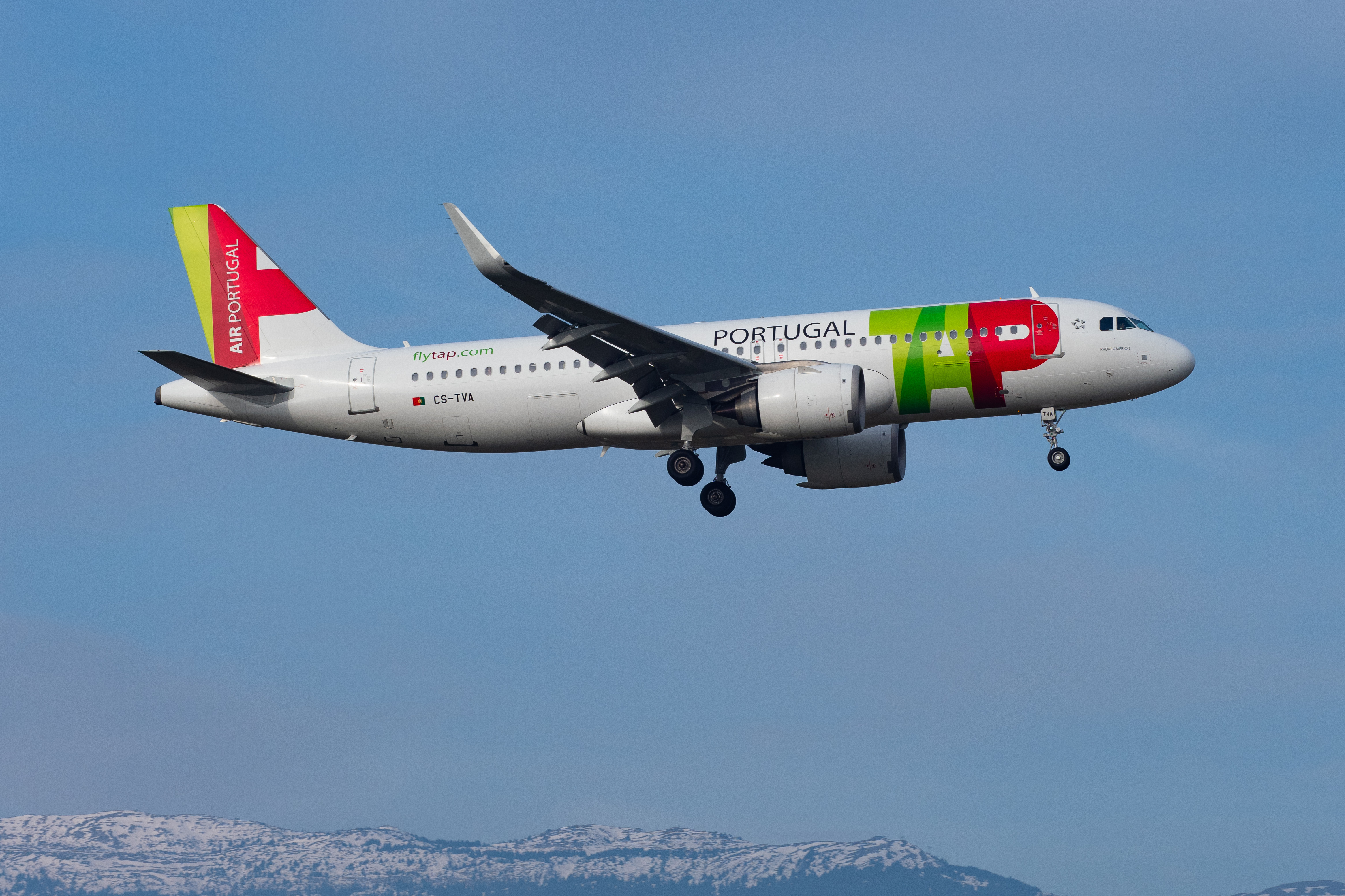 GVA Parking TAG